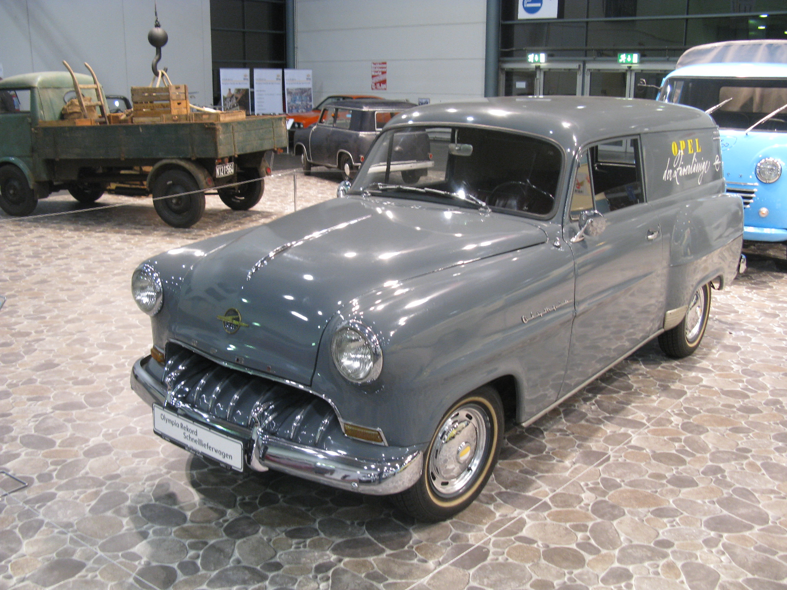 Opel Olymoia Rekord Schnellieferwagen